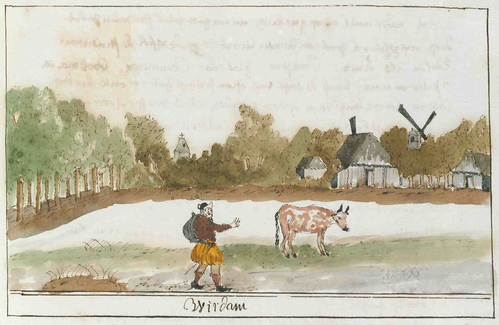 Korte Beschreijving van de Steden Dorpen Gehugten en Heeren-huizen der Heerlykheid Vriesland Benevens Desselfs Afbeeldingen Meest na 't leven getekent By een Vergaderdt Door Andries Schoemaker